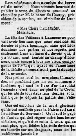 Journal L'Ouest-Eclair du 9 décembre 1899.